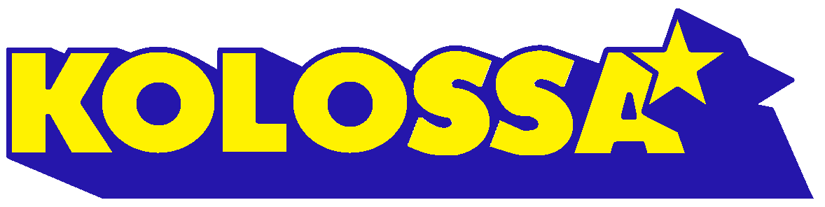 Aufschrift Kolossa Warenhaus